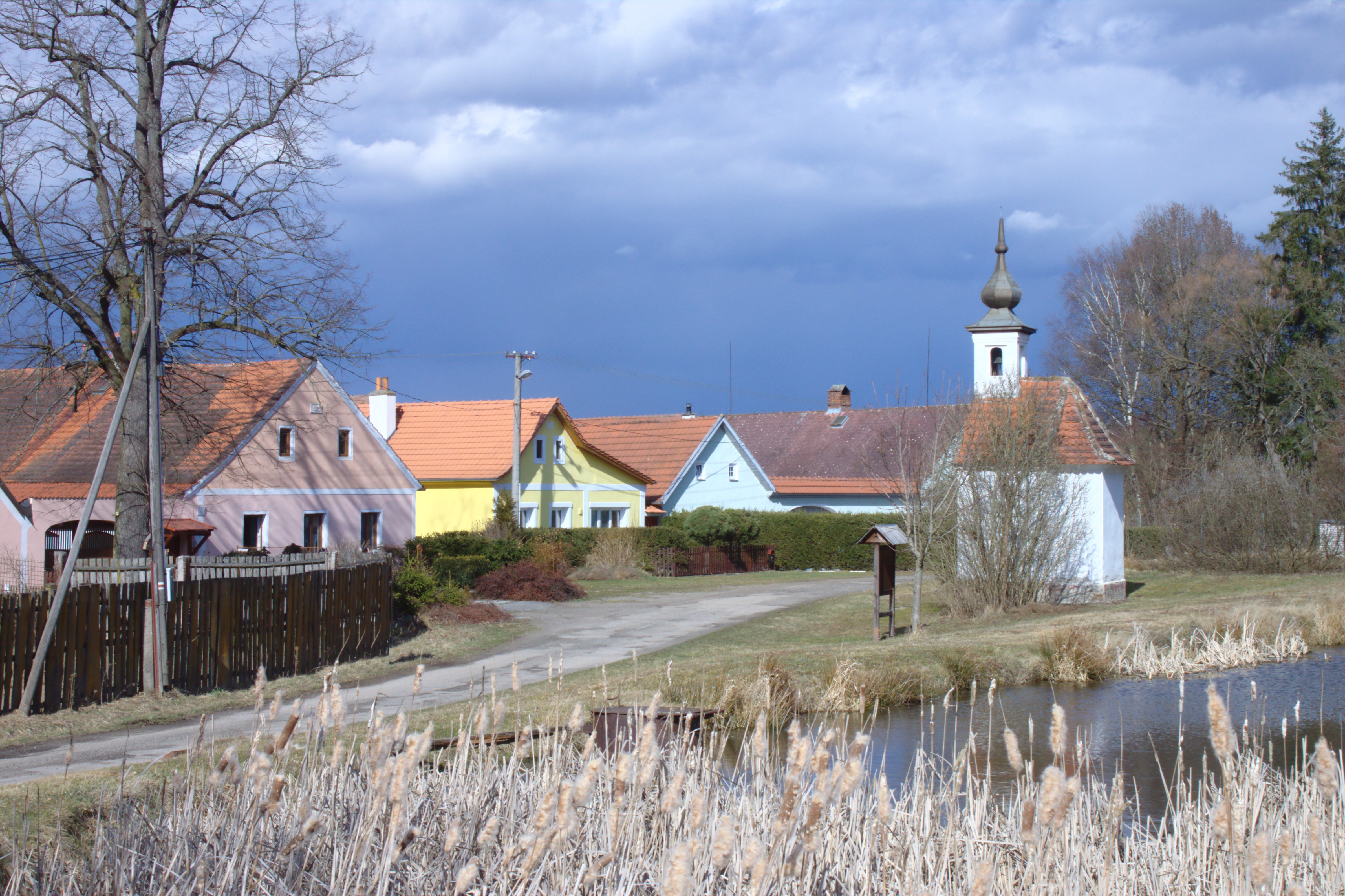 Náves ve vesnici Polžov Project: Fotíme Česko